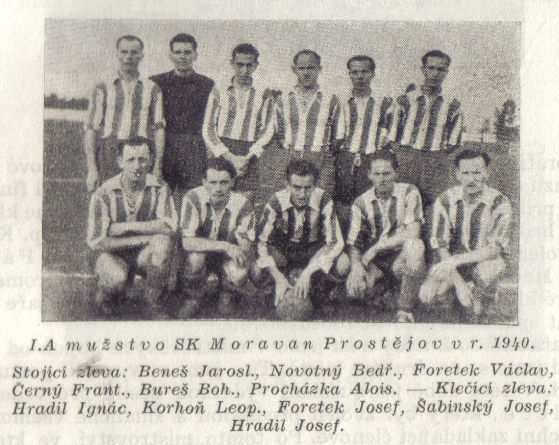 foto fotbalového týmu